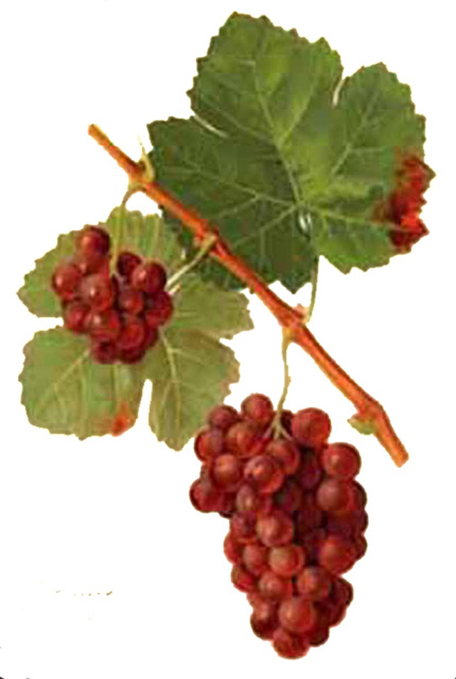 Grappe de Gewürztramine par Viala et Vermorelr